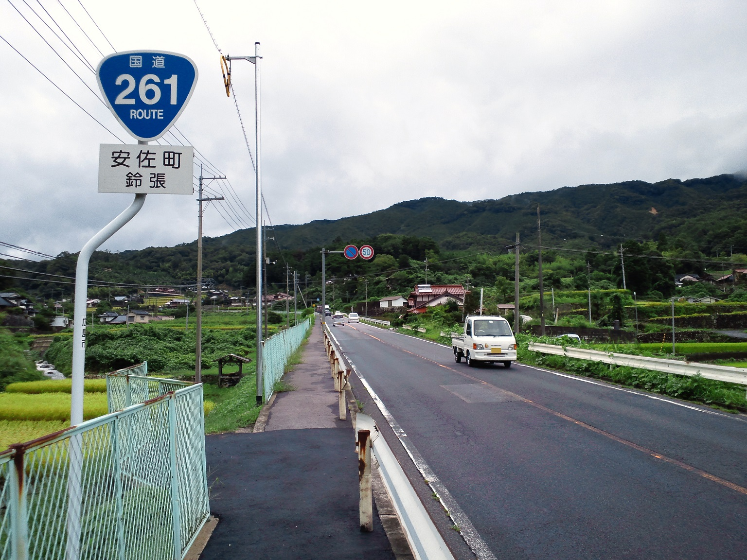 広島市安佐北区安佐町大字鈴張付近の国道261号。